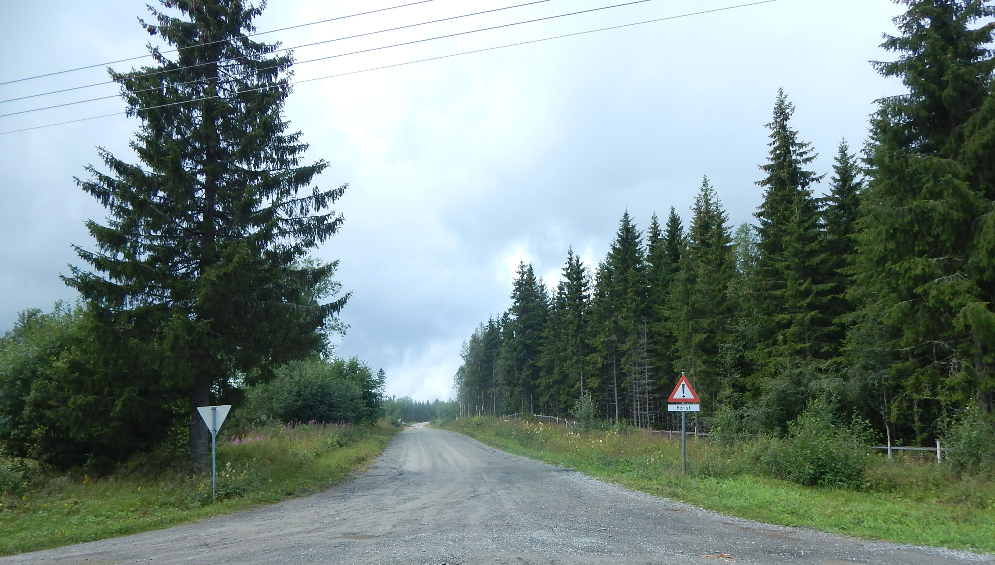 Østenden av Veldresagvegen (fylkesvei 1714, tidl. 49) sett fra Brumundvegen (fylkesvei 1710) ved Gundersvea